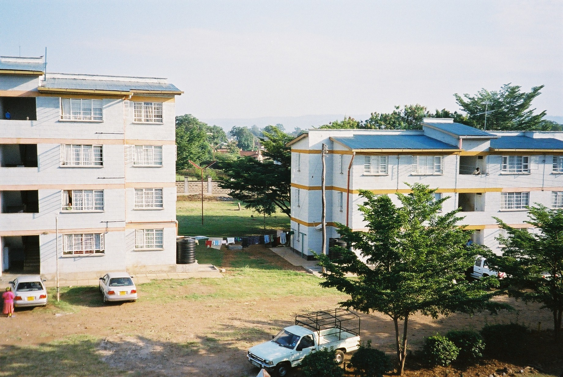 Kenya - Kisumu - Mayfair Estate - juillet 2006